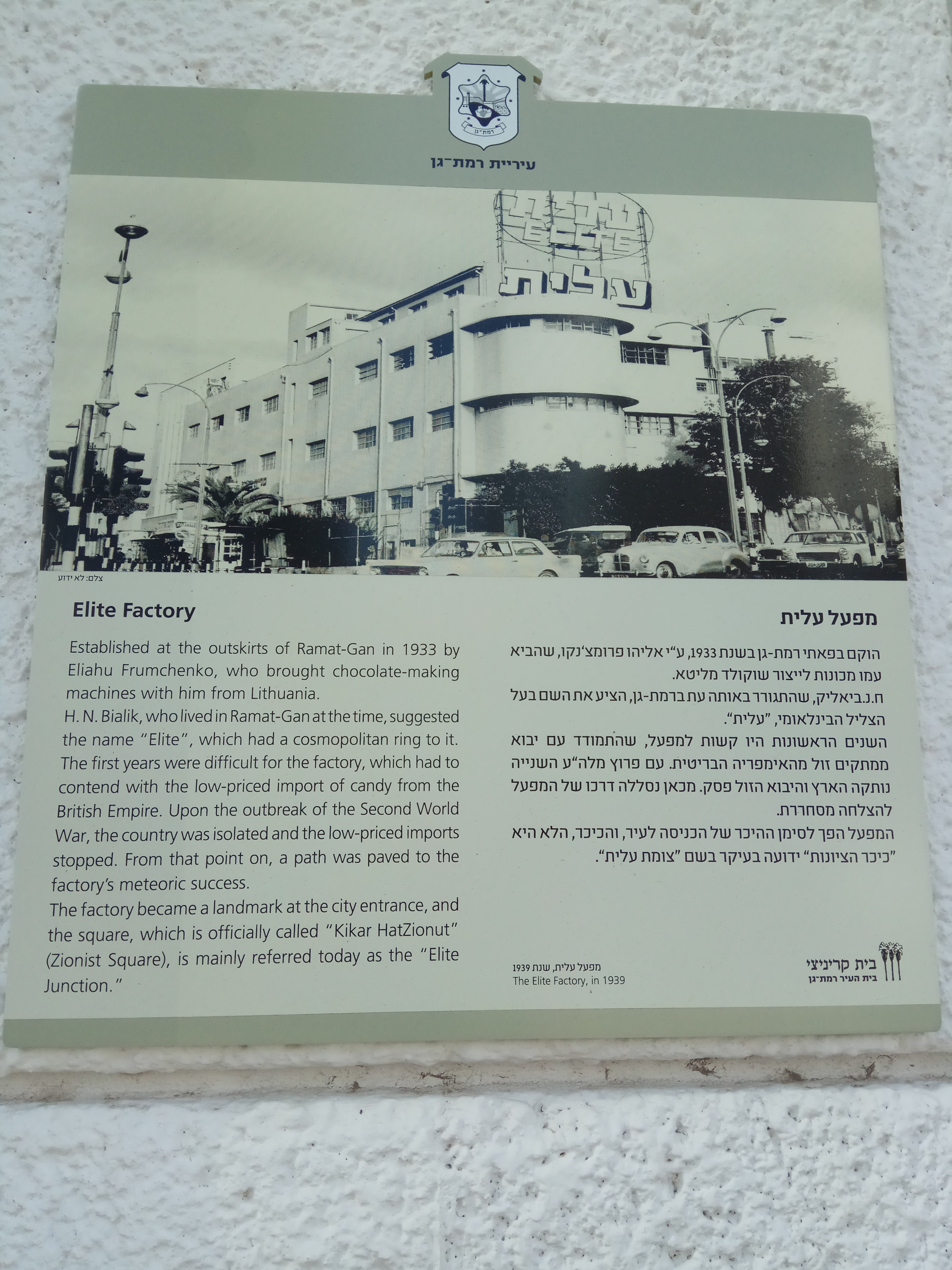 שלט הסבר על בית החרושת עלית לשעבר ברמת גן